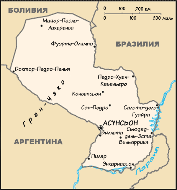 русская версия